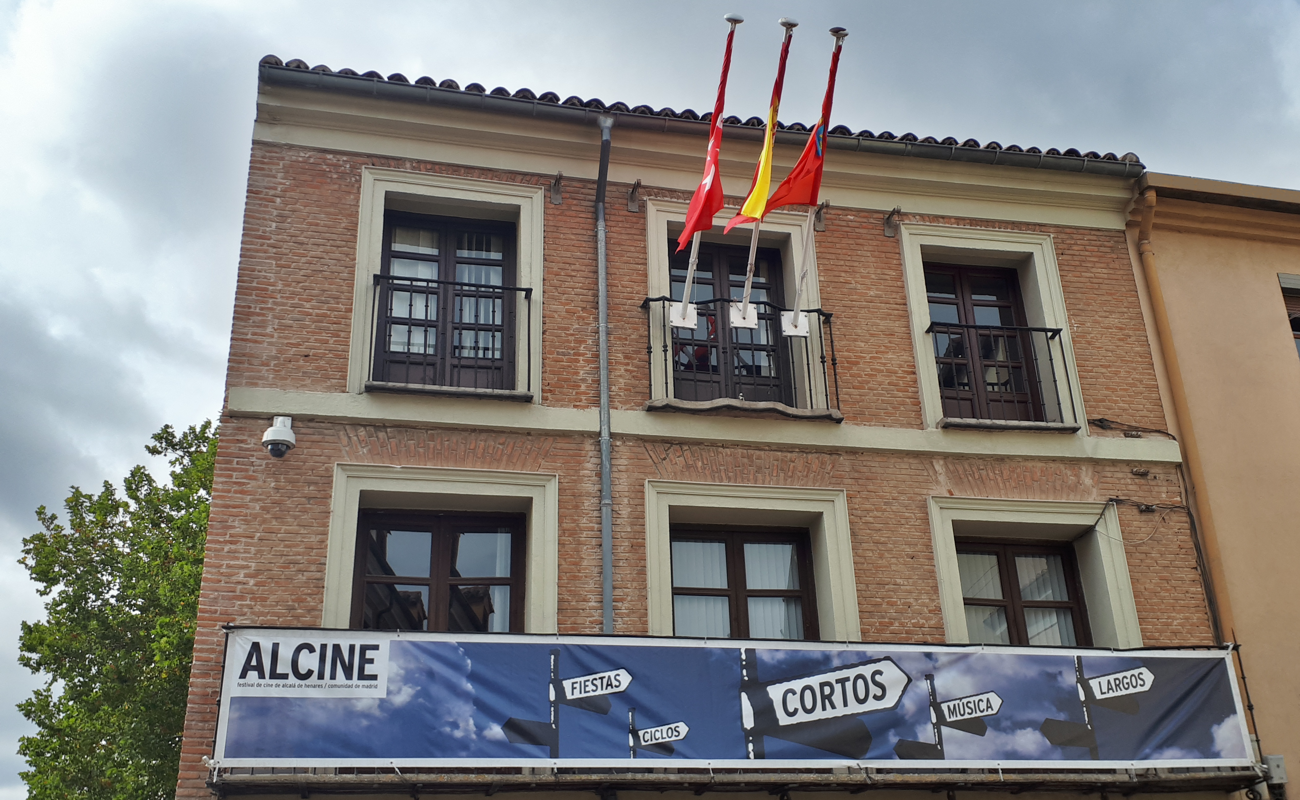 Casa Tapón, sede del Festival de Cine de Alcalá de Henares (Comunidad de Madrid - España).